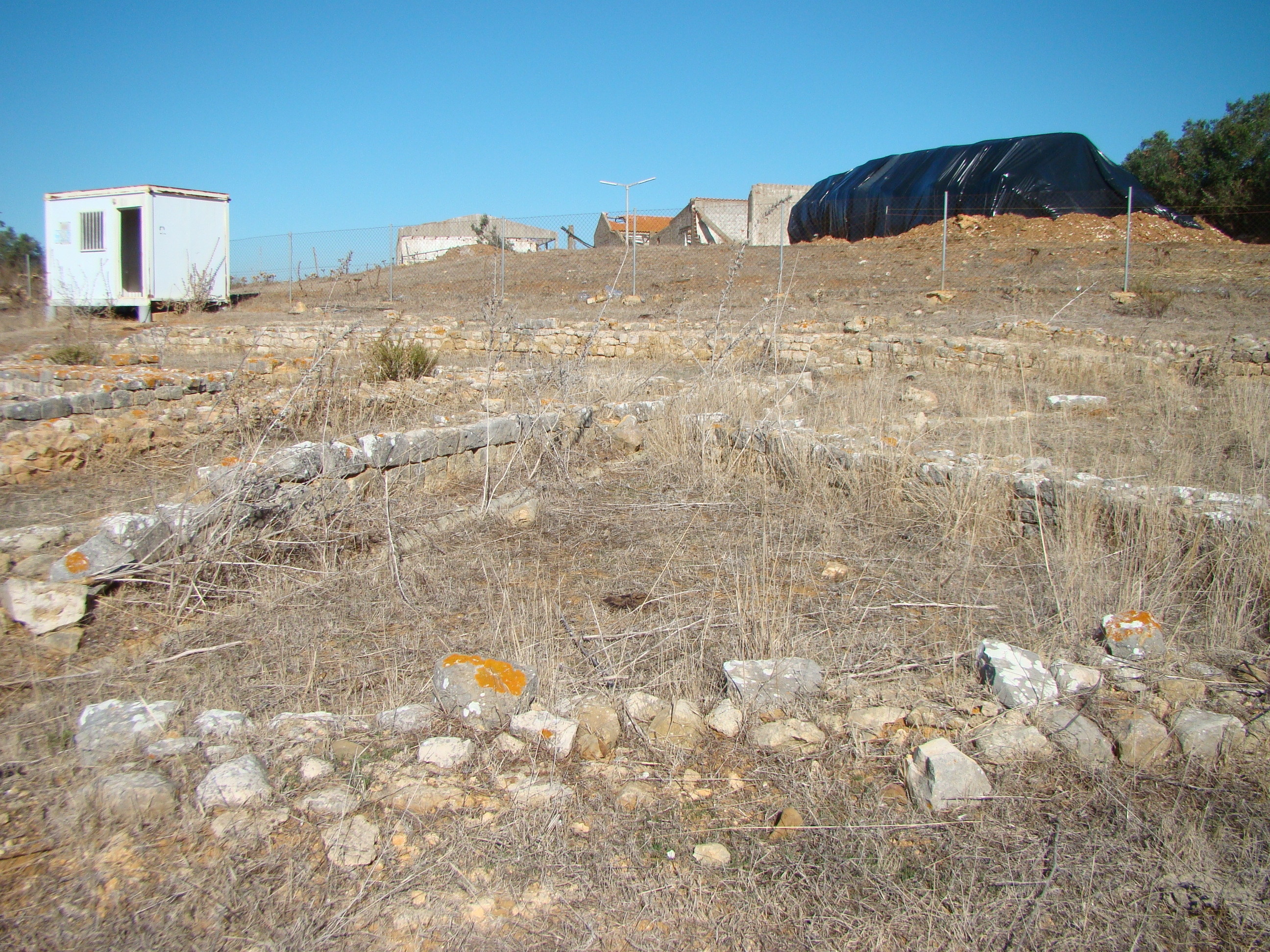 Villa Romana da Abicada 2017 10